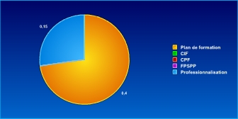 New salarié 10